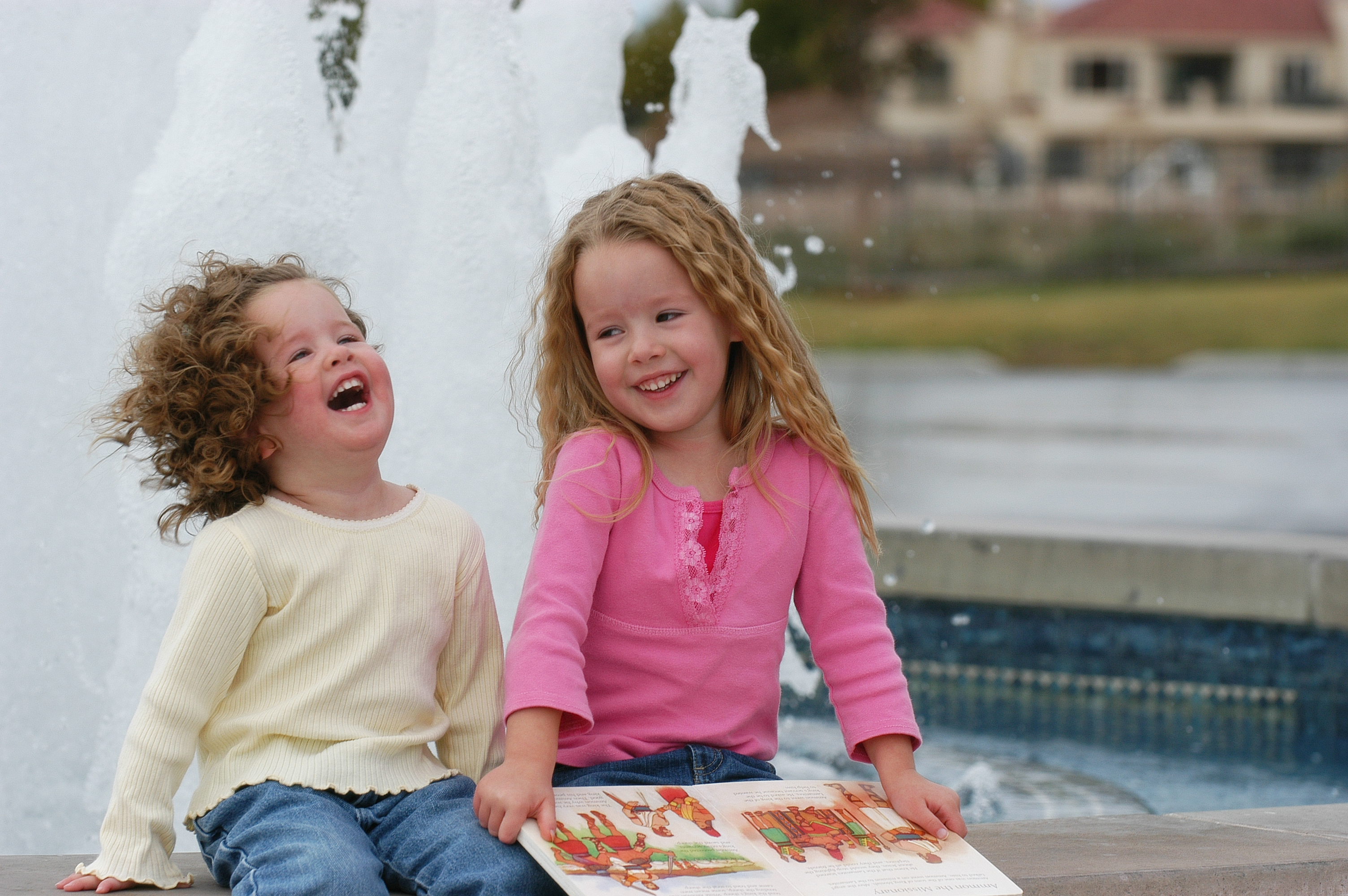 Best Viewed Large